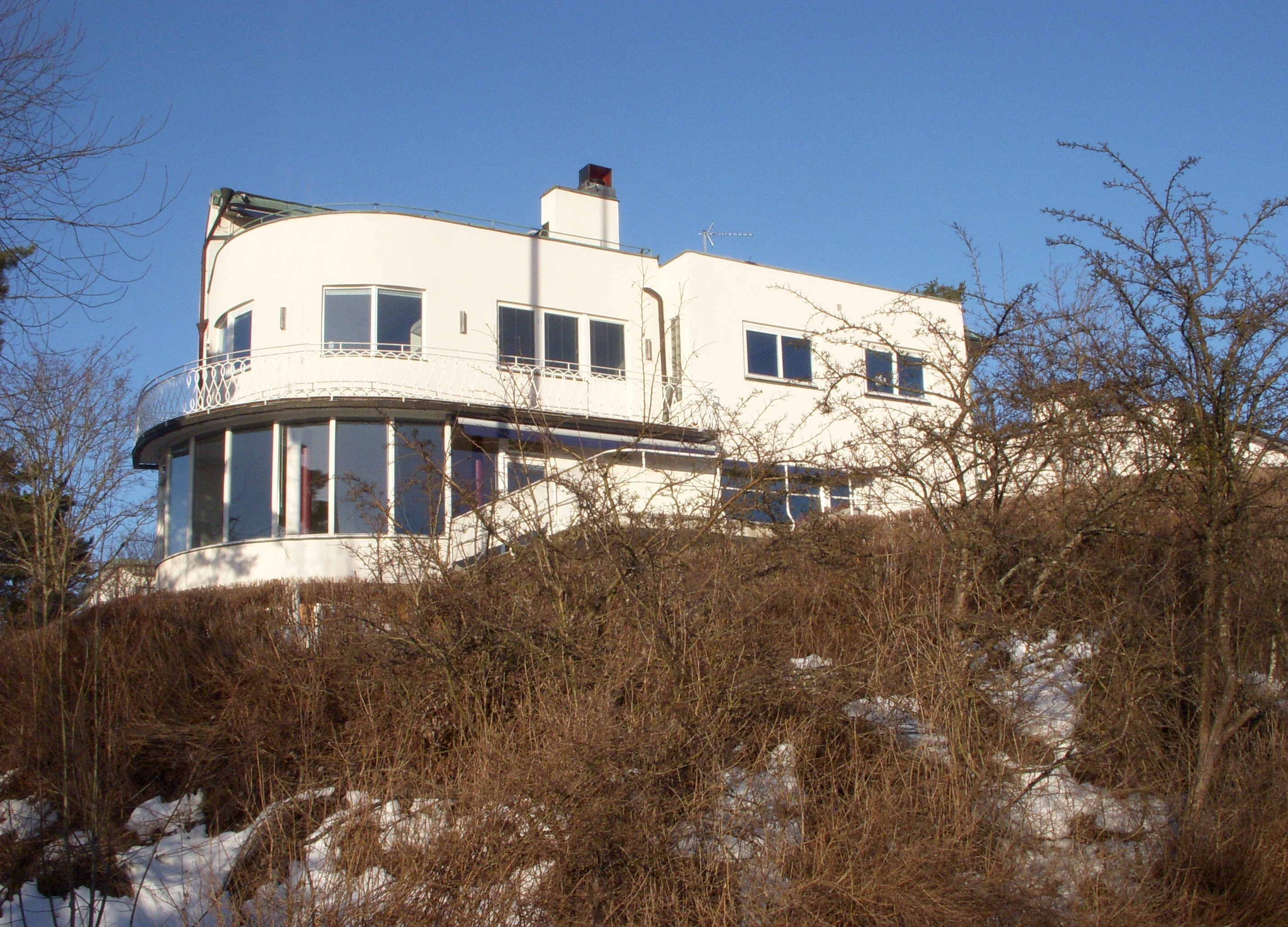 Ängbyhöjden 32, Södra Ängby. Arkitekt Björn Hedvall. Byggår 1938.